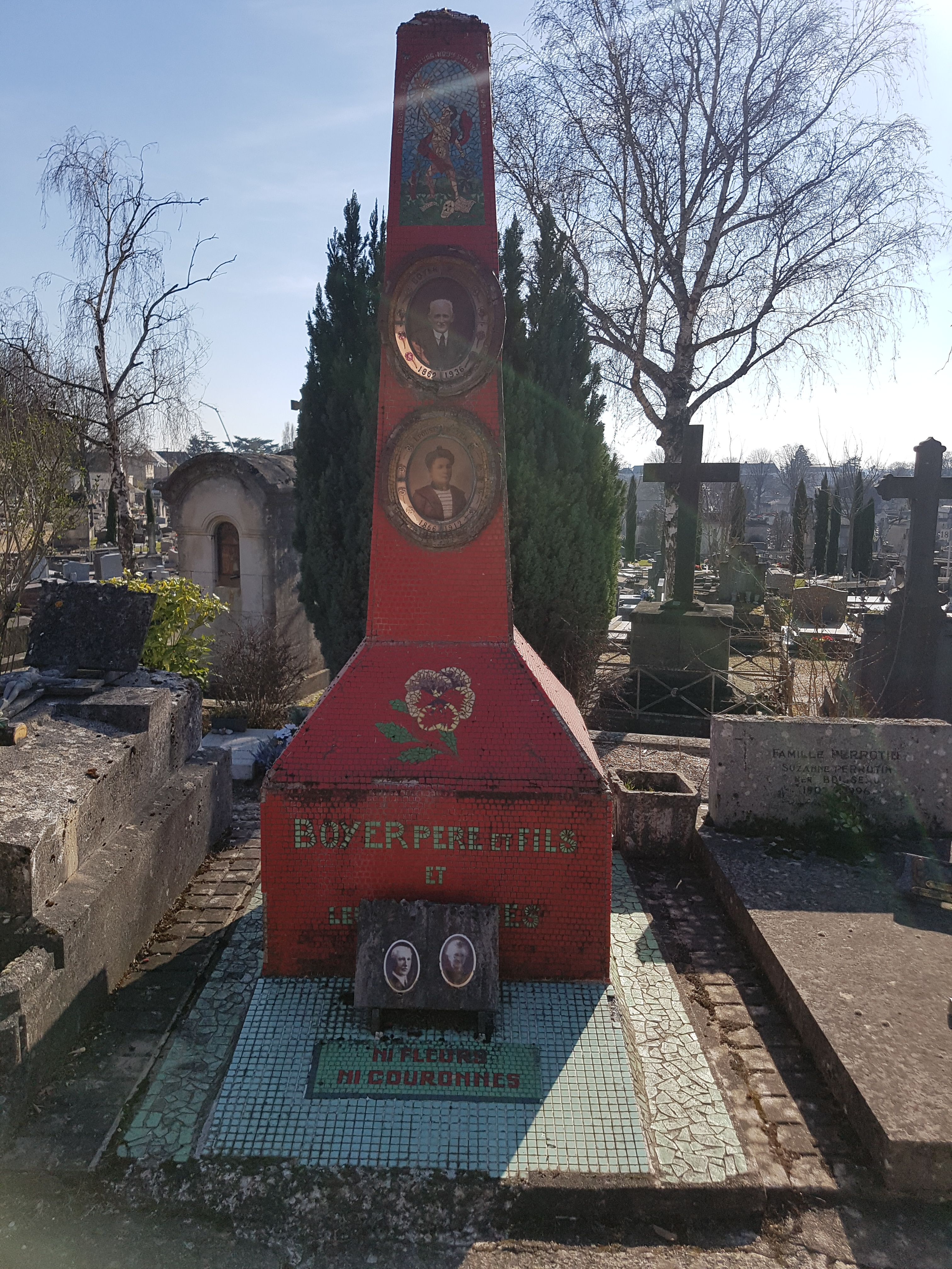 Obélisque sur la tombe de la famille Boyer au cimetière de La Salle à Tours